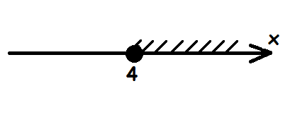 x ir vienāds un lielāks nekā 4